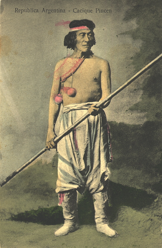 Caquique Mapuche Pincen. Argentina circa 1902.